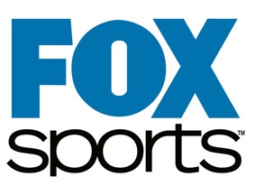 Logotipo del canal FOX SPORTS